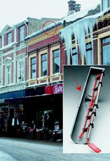 Comparație între un acoperiș degivrat și un acoperiș înghețat